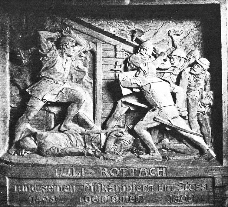 (Uli Rotach kämpft vor der brennenden Hütte gegen den Feind). Uli Rottach-Relief (1904) Rathaus Appenzell. Von Valentin Walter Mettler (1868–1942) Bildhauer